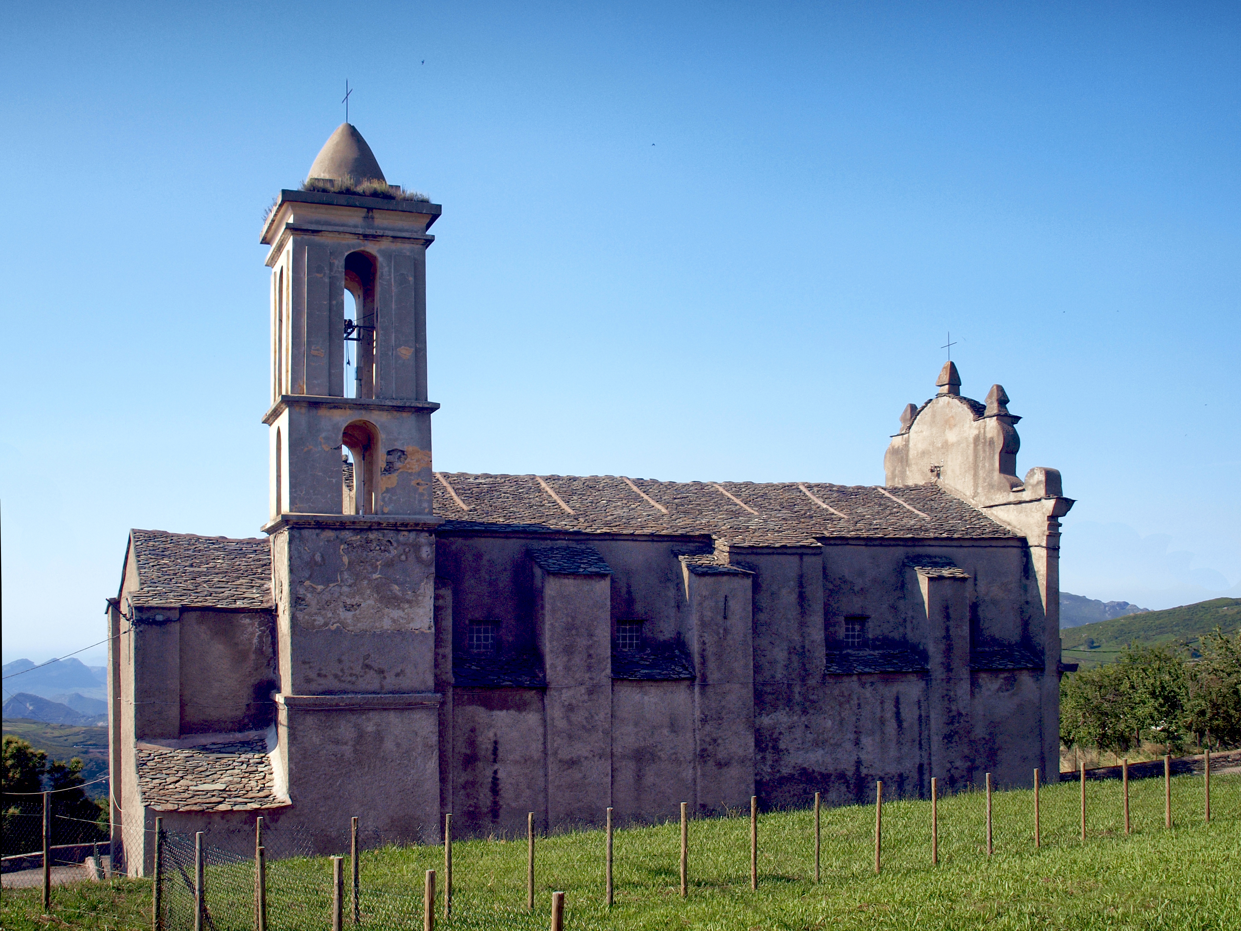 Rutali, Nebbio (Corse) - L'église paroissiale San Vitu du XVIIe siècle.